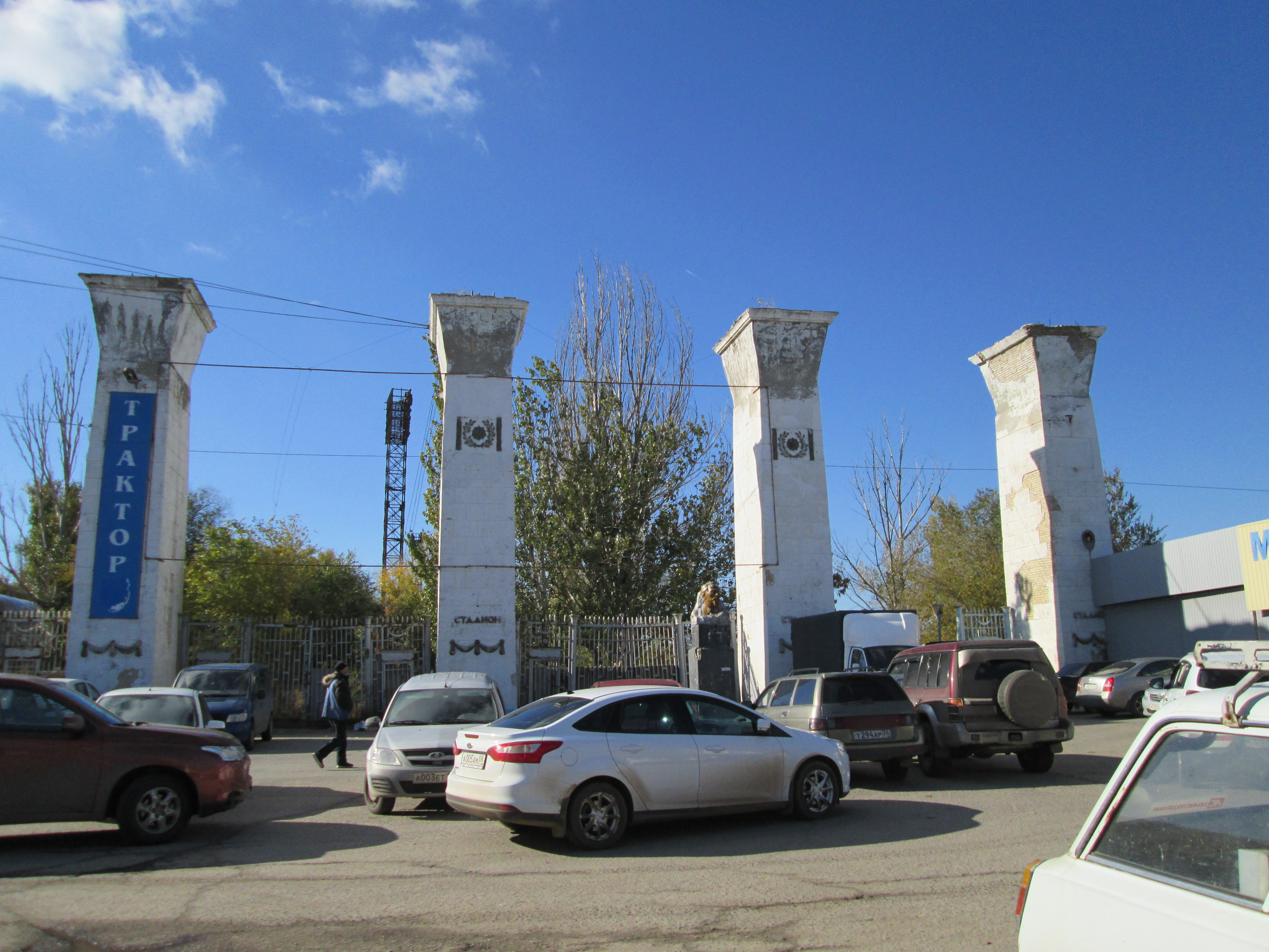 Проходные стадиона СТЗ (ВГТЗ) "Трактор"